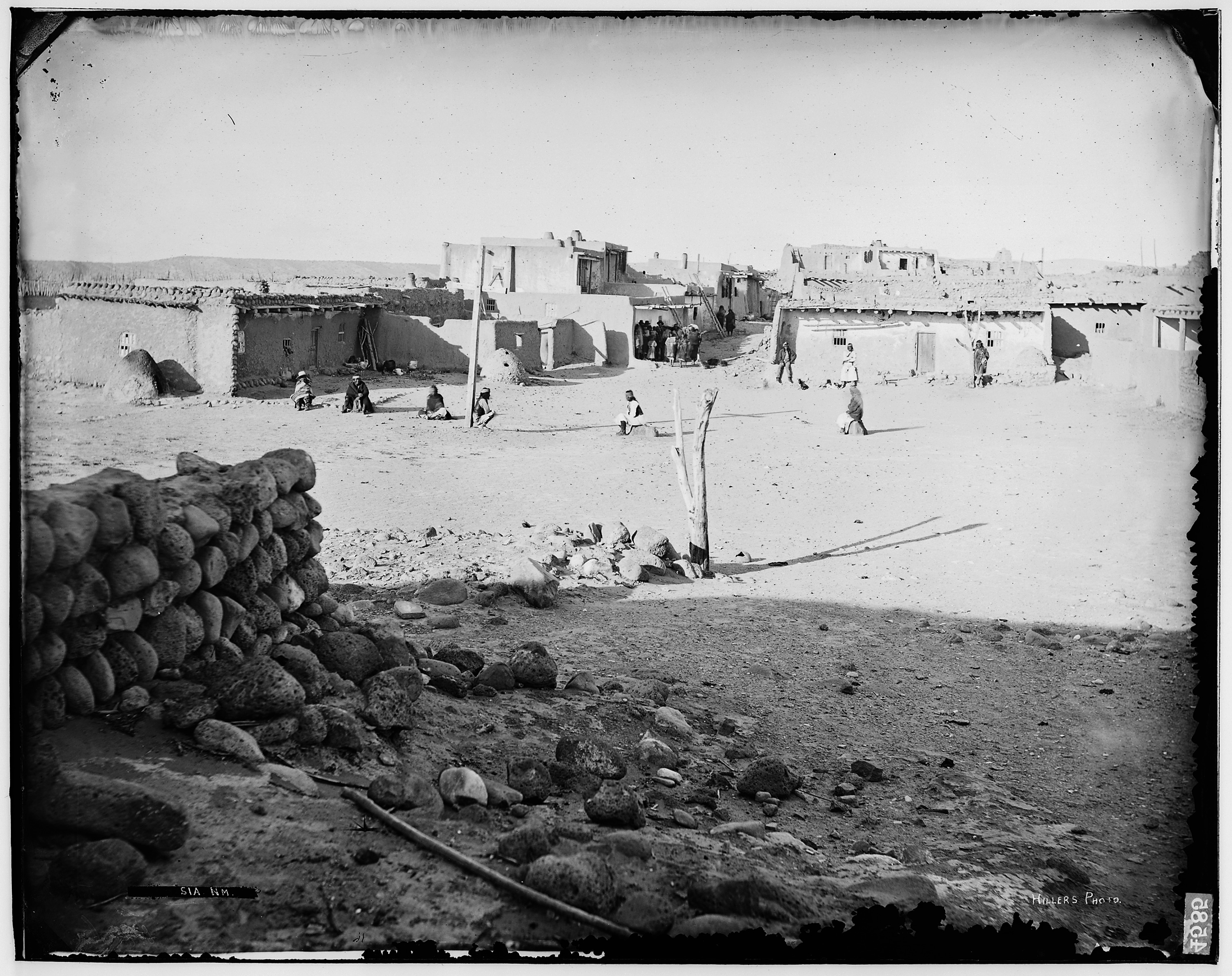 Scope and content: (Zia Pueblo)